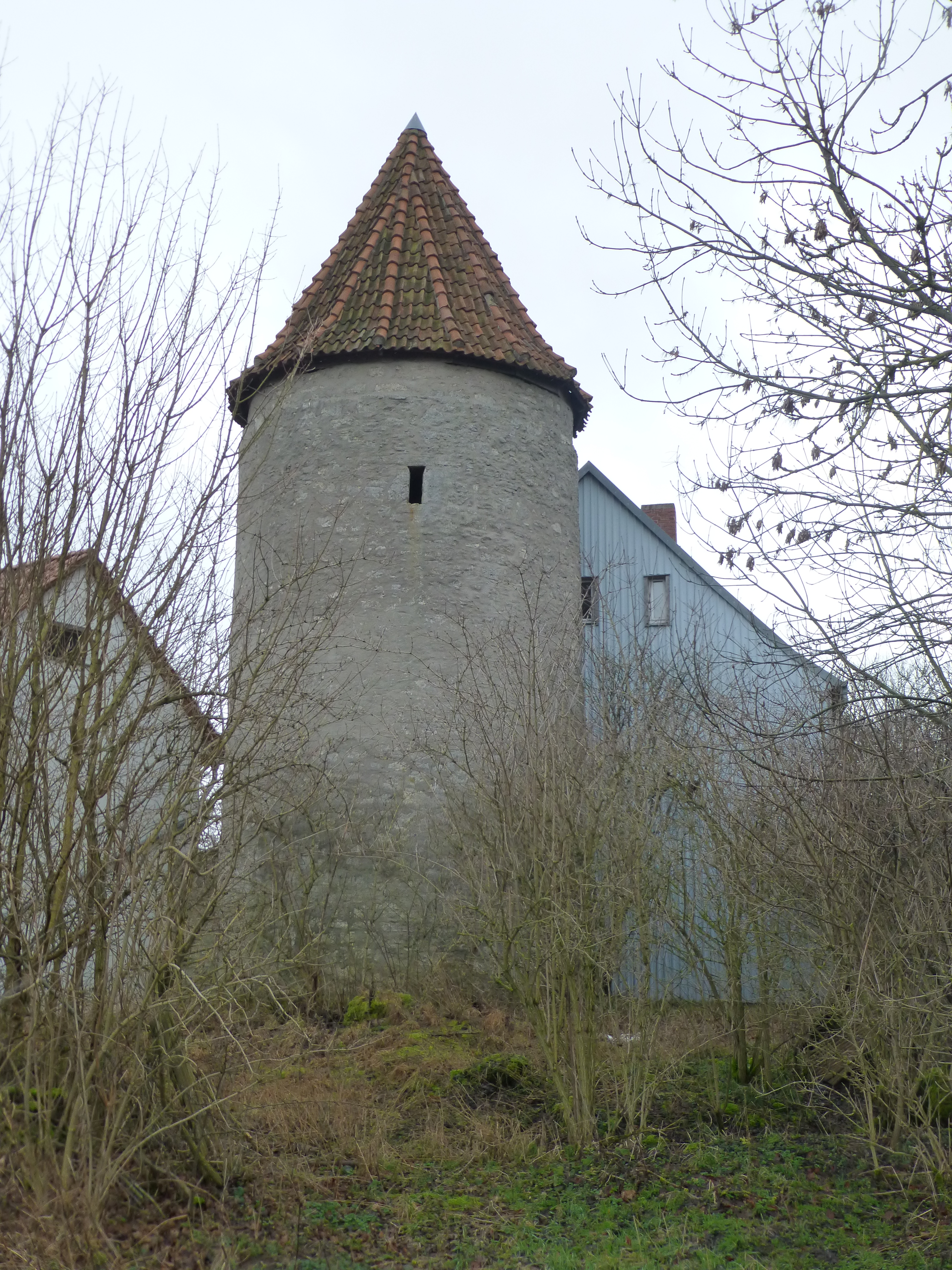 Turm der Lengefelder Warte